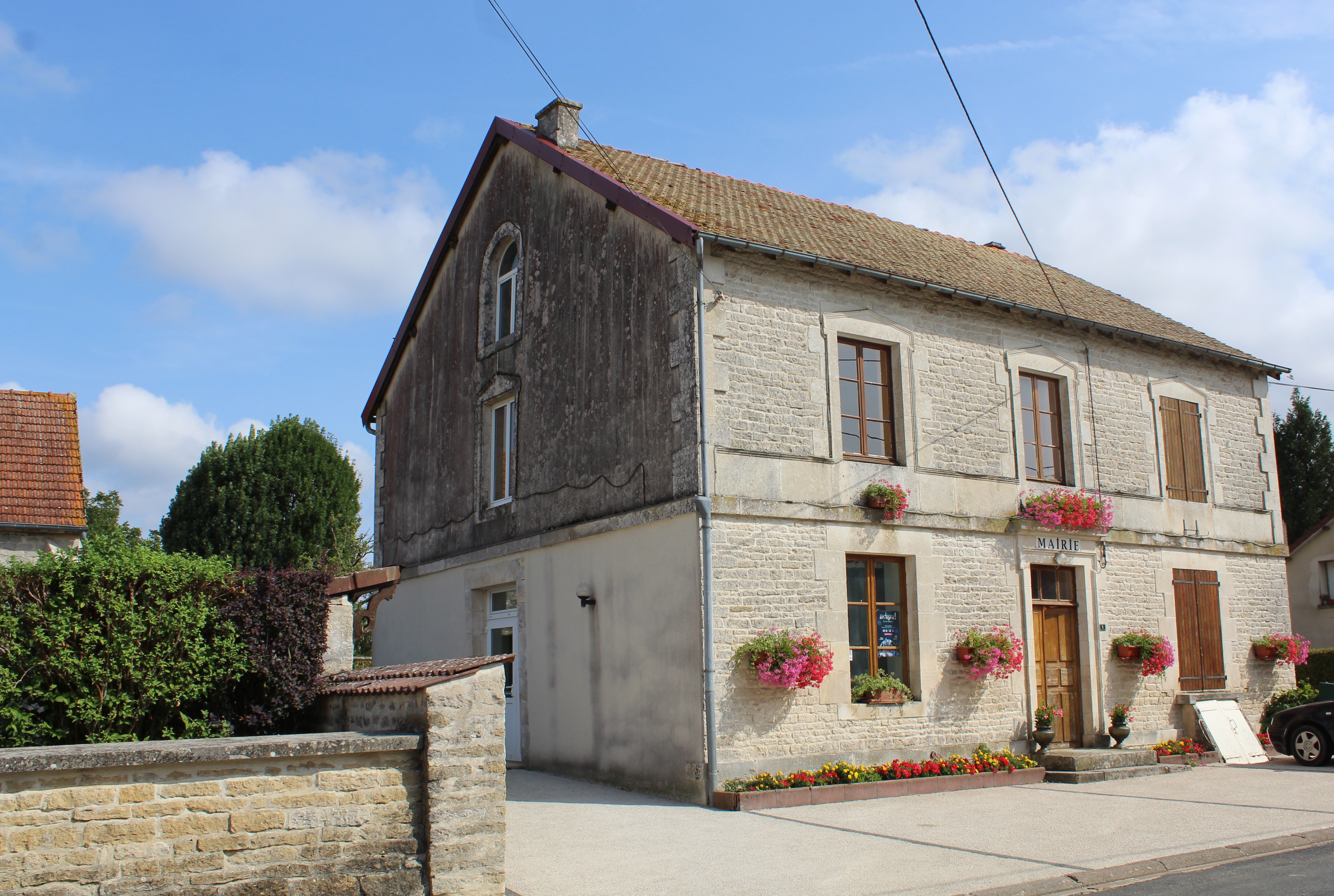 La mairie